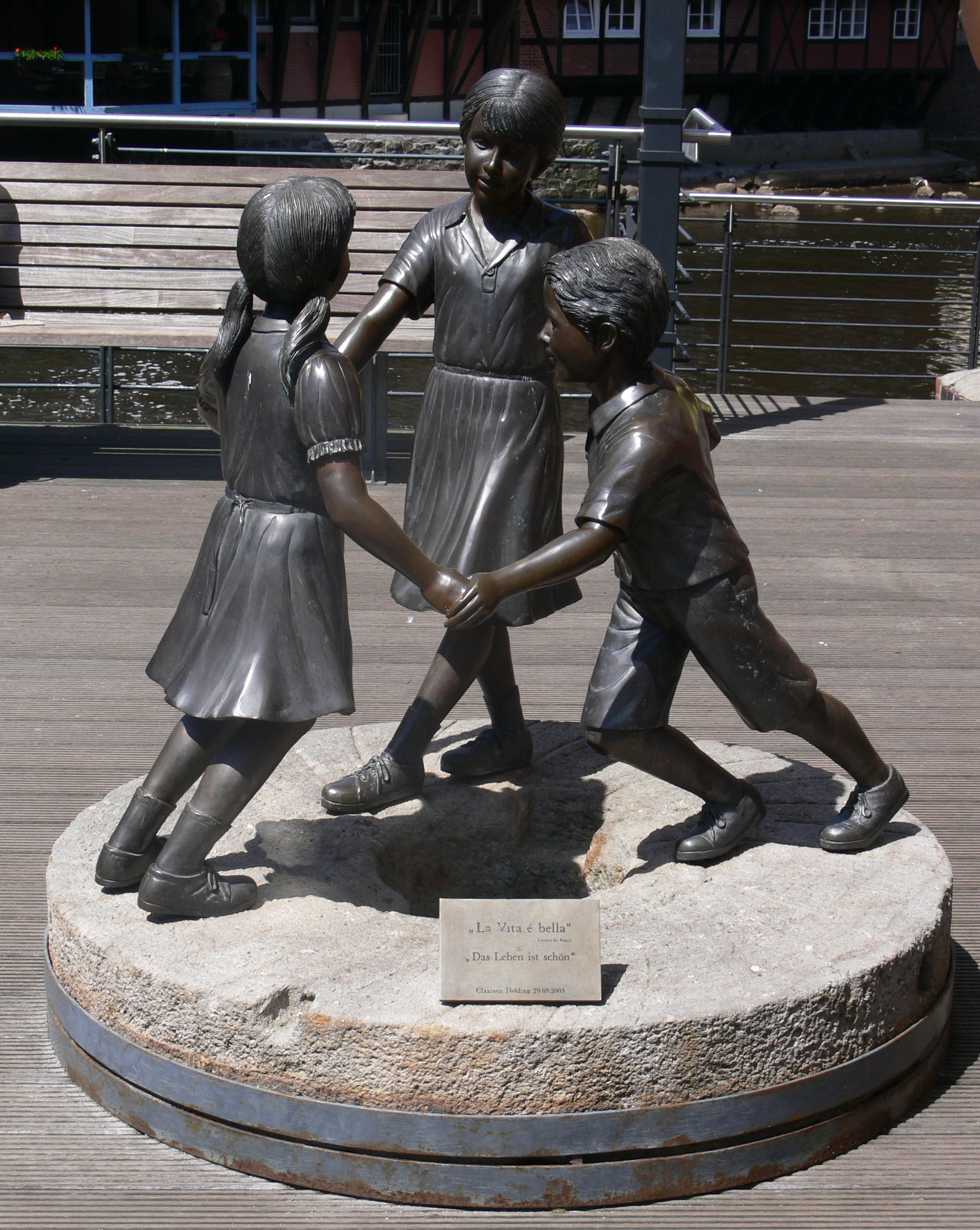 Lüneburg, Skulptur „La vita è bella – Das Leben ist schön“, angeblich von einem „Leonardo Rossi“ (wohl Fakename für anonyme Werke bzw. Kunstfälschungen, siehe hier), aufgestellt am Hotel Bergström von der Claassen Holding, 2003 (laut Beschriftung)